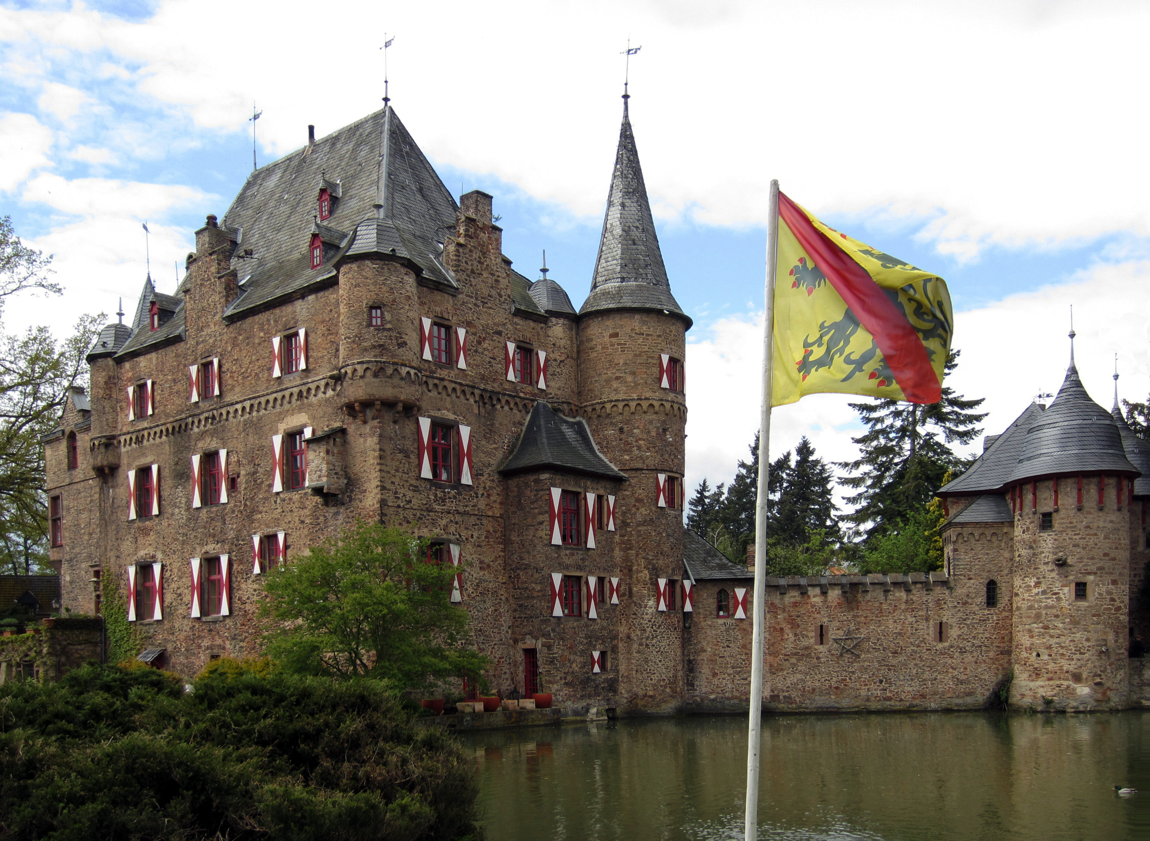 Außenansicht der Burg Satzvey mit Teich, Mechernich-Satzvey This is a photograph of an architectural monument.